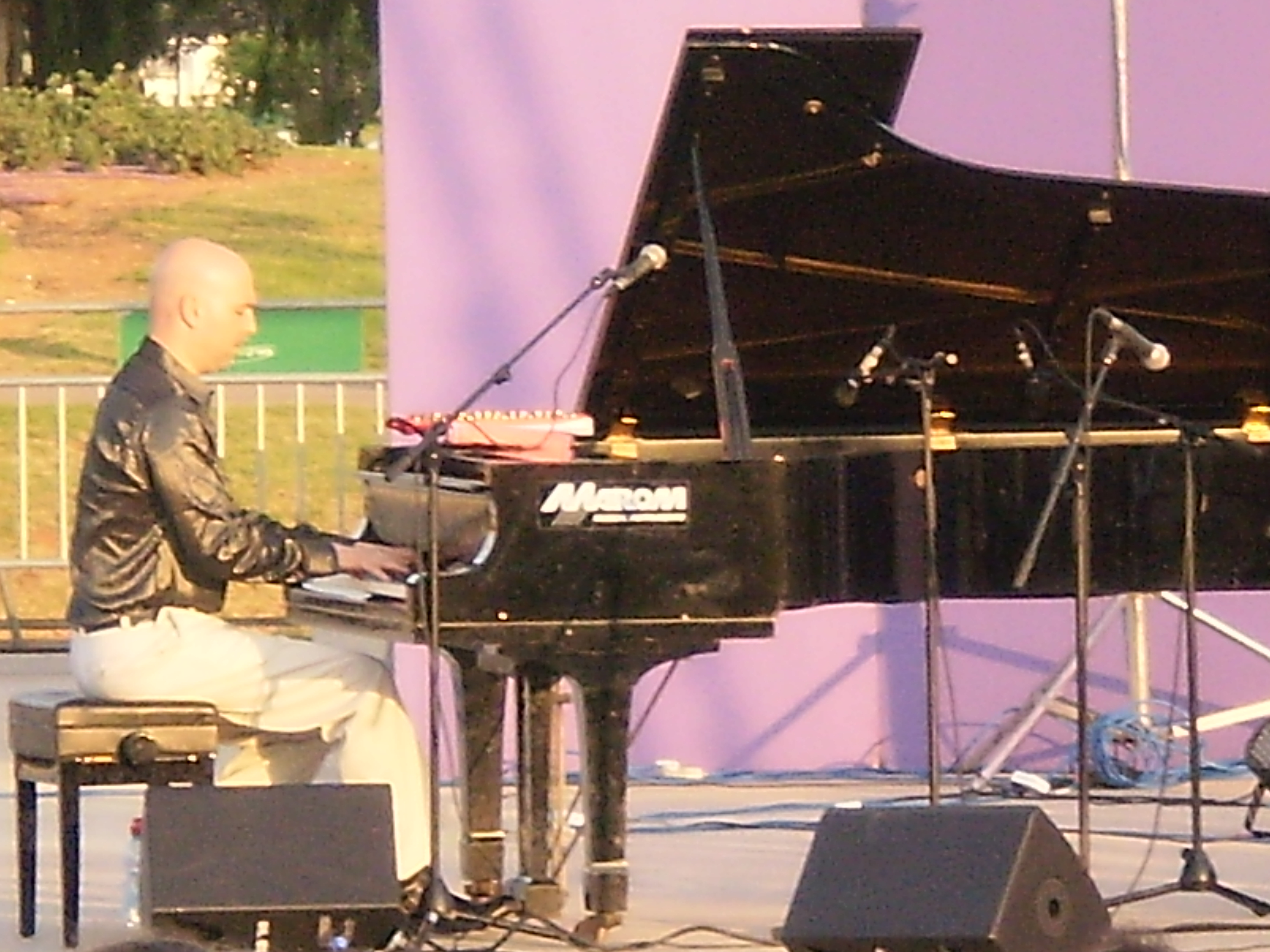 גיל שוחט בהופעה בפארק הרצליה